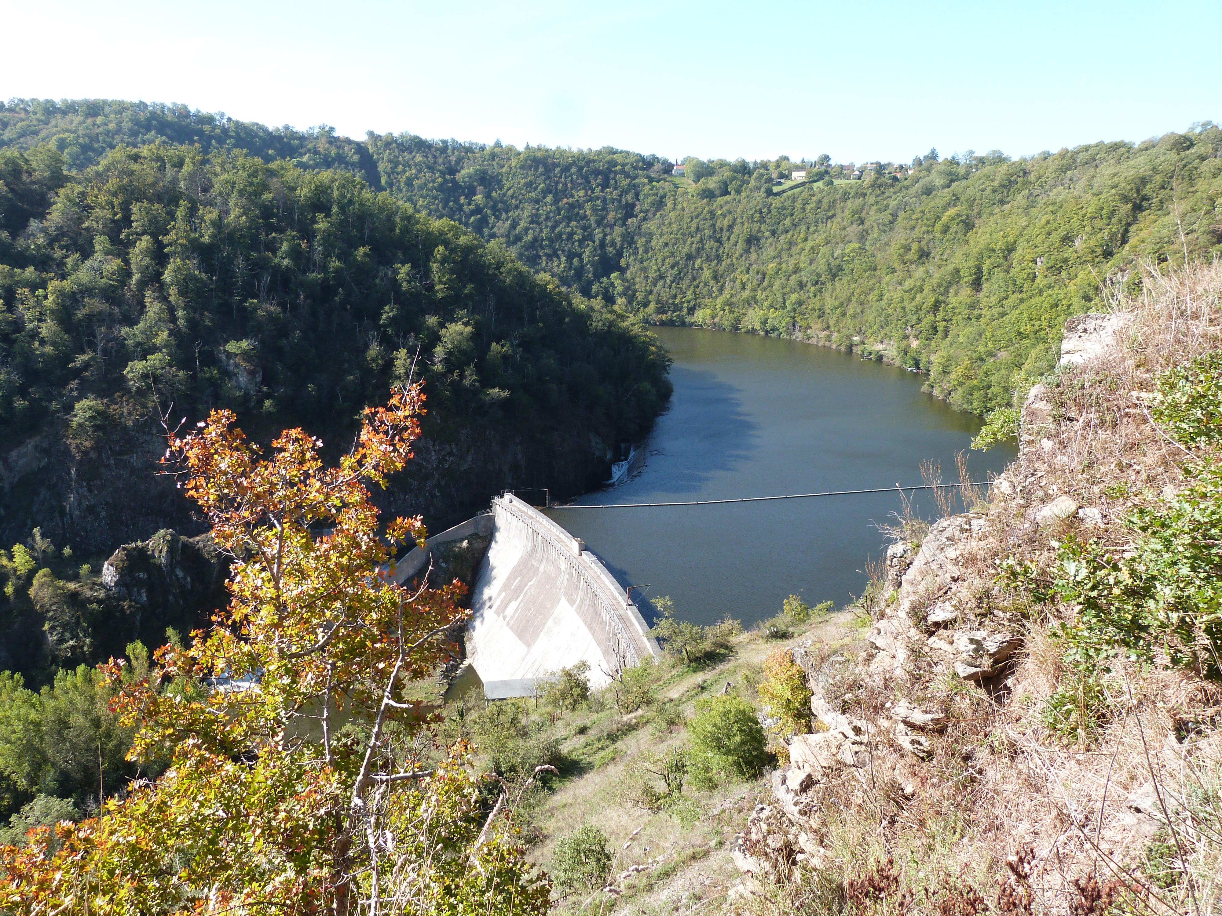 Côté amont du barrage de Thuriès